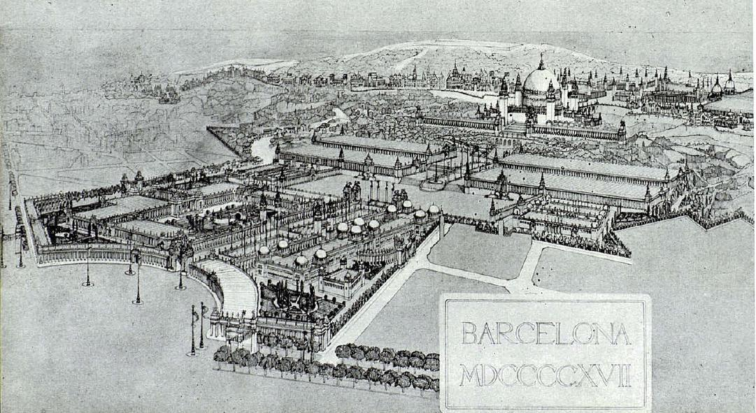 Planol del projecte inicial de Puig i Cadafalch per a l'Exposició Internacional de 1929 a Barcelona. Posteriorment va ser adaptat.